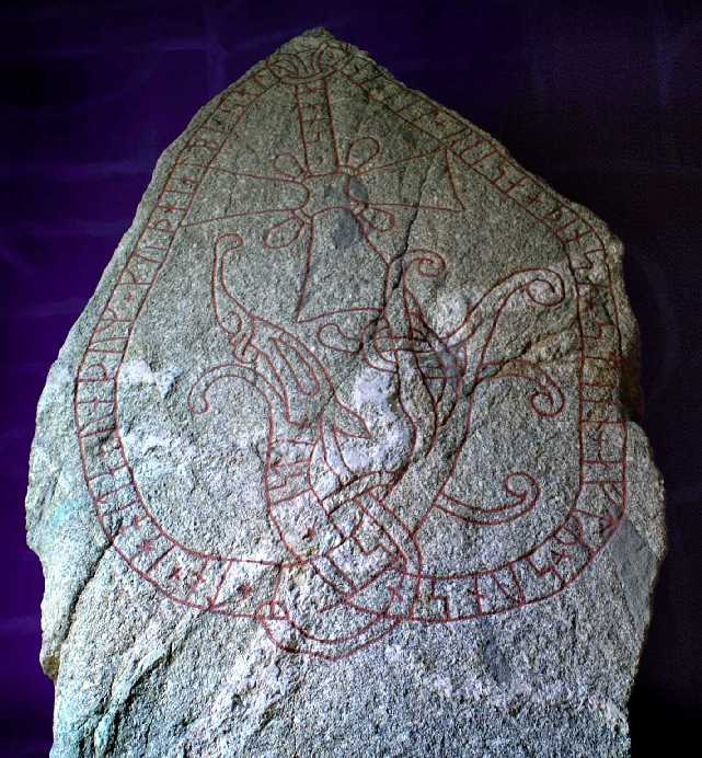 U613, runsten från Torsätra